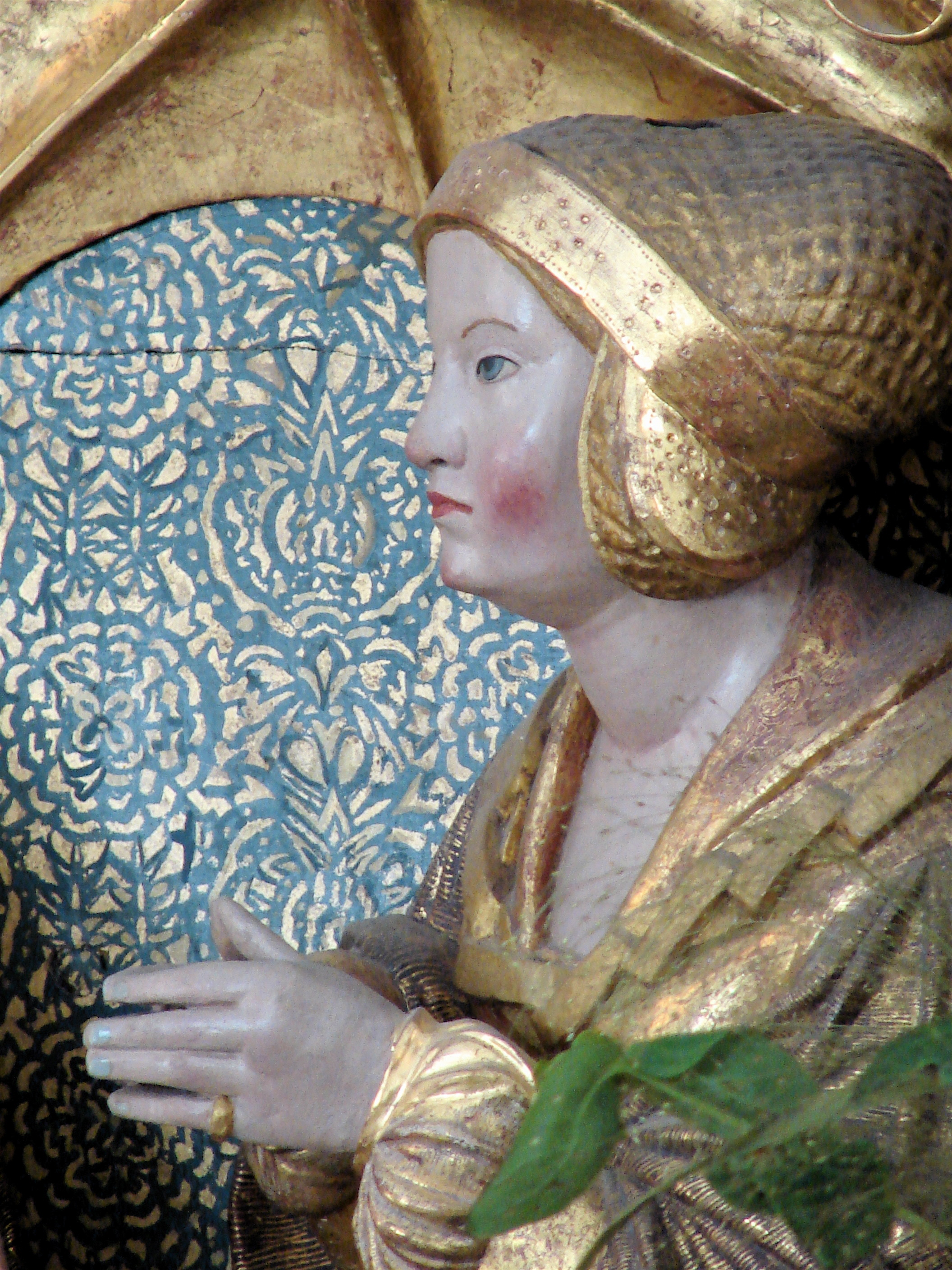 Elisabeth (1485-1555), kurfyrstinne af Brandenburg, fra Claus Bergs altertavle i Odense Domkirke, Fyn